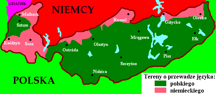 Mapa orientacyjnego zasięgu języków polskiego i niemieckiego na obszarze plebiscytowym